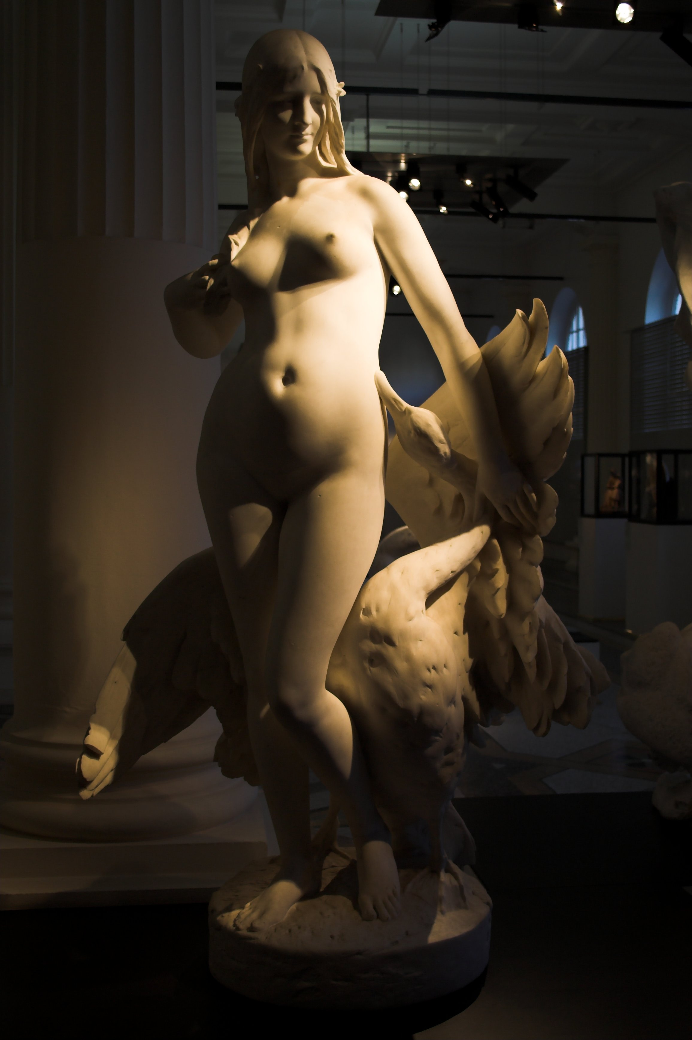 a sculpture by Jules Roulleau (Musée de Picardie, Amiens, France)